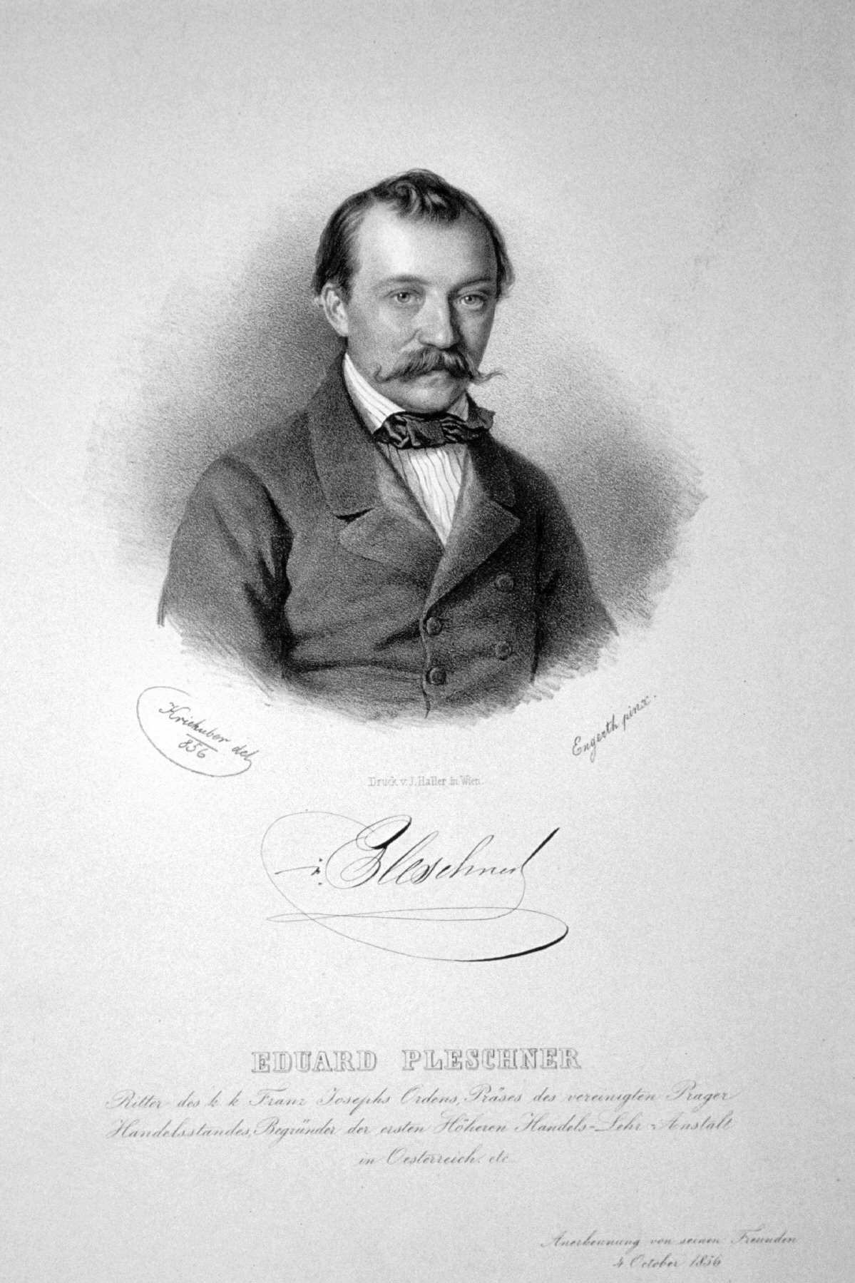 Eduard Pleschner, Ritter von Eichstett (1813-1864), Industrieller, Präsident der Prager Handelskammer, Gründer der Prager Handelsakademie Lithographie von Josef Kriehuber nch einem Gemälde von Engerth, 1856